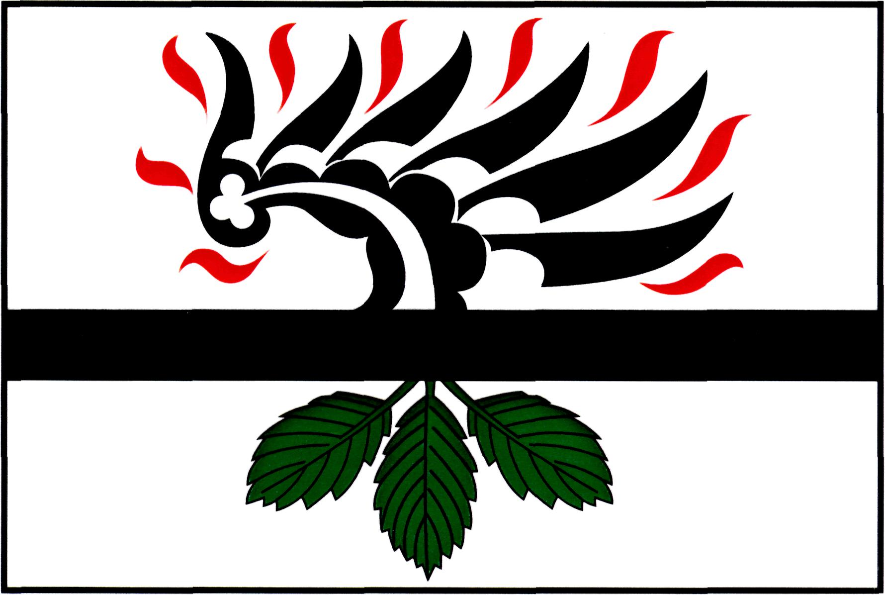 Vlajka obce Habřina